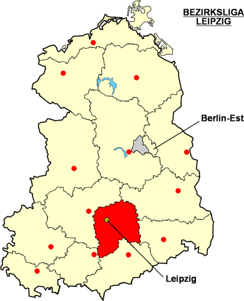 Localisation de Leipzig dans la "Bezirksliga Leipzig" Catégorie:Logo de clubs de football - Allemagne